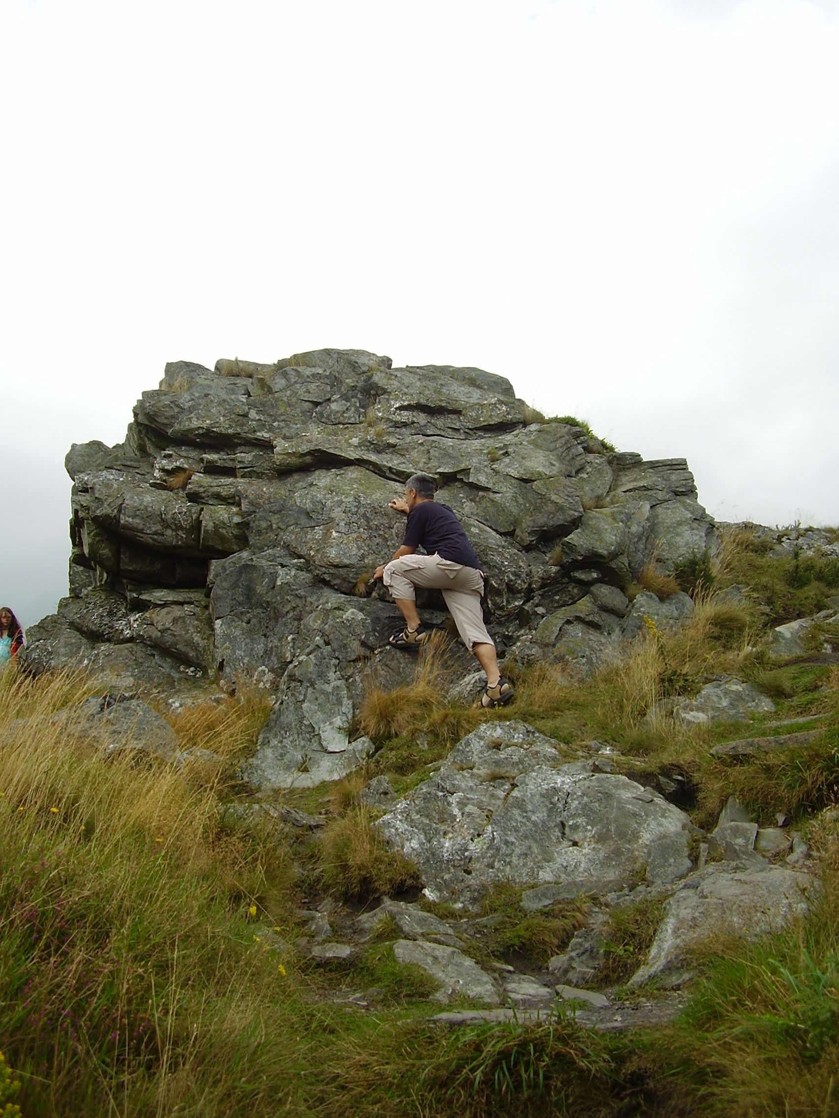 Plounéour-Ménez, Roc'h Trevezel, Bretagne; Frankreich